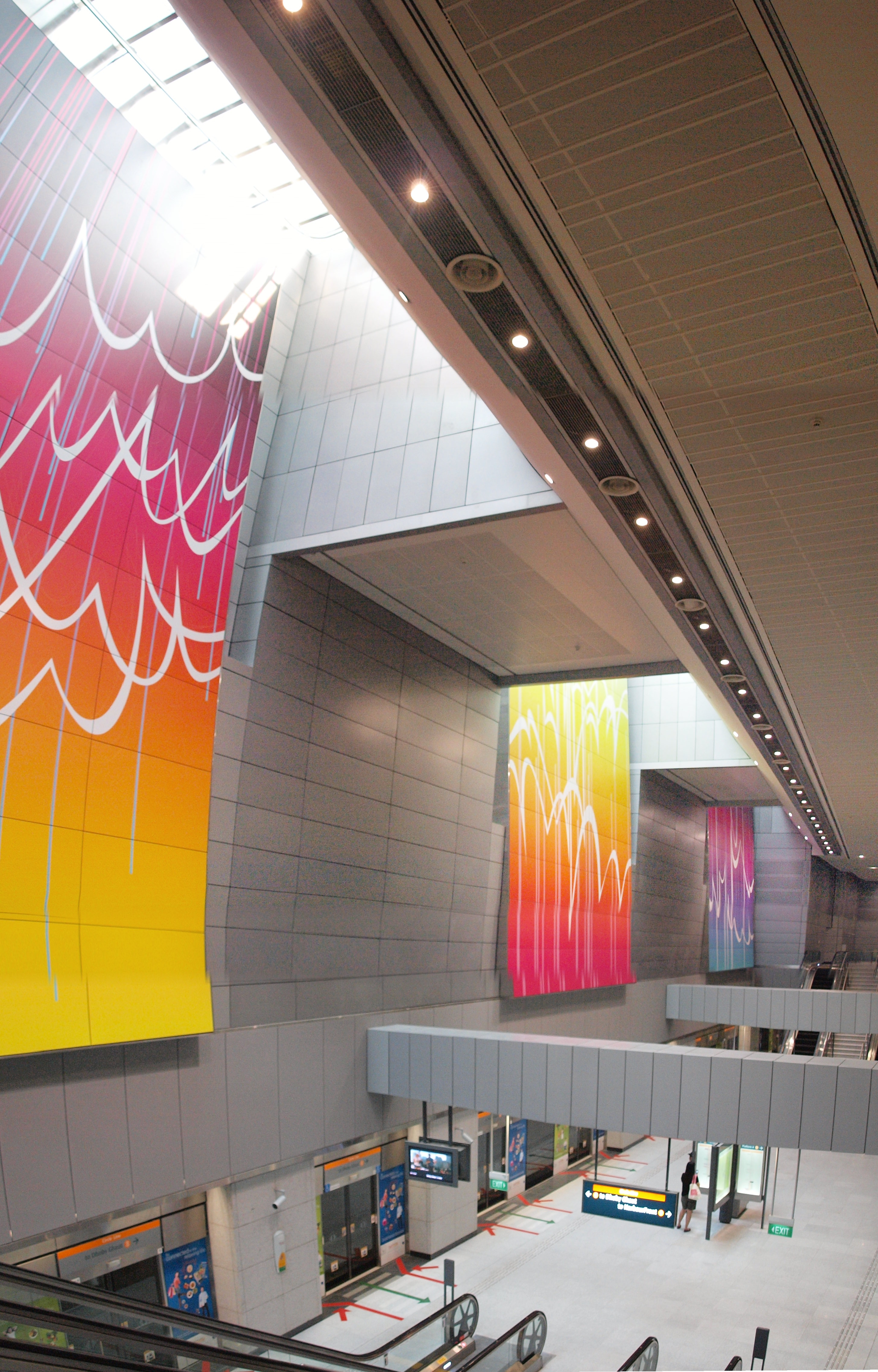 station interior